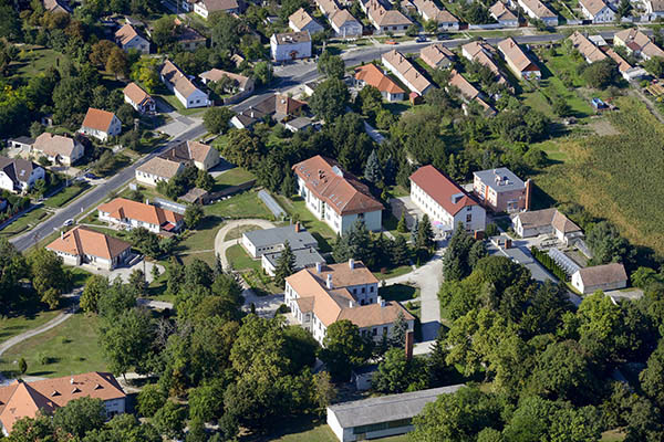 Dáka légi fotó